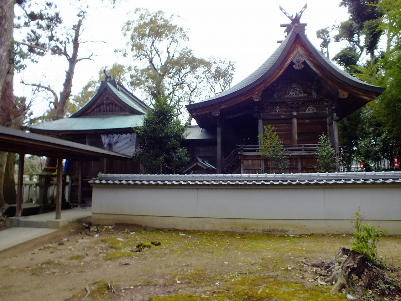 御坂神社拝殿と本殿